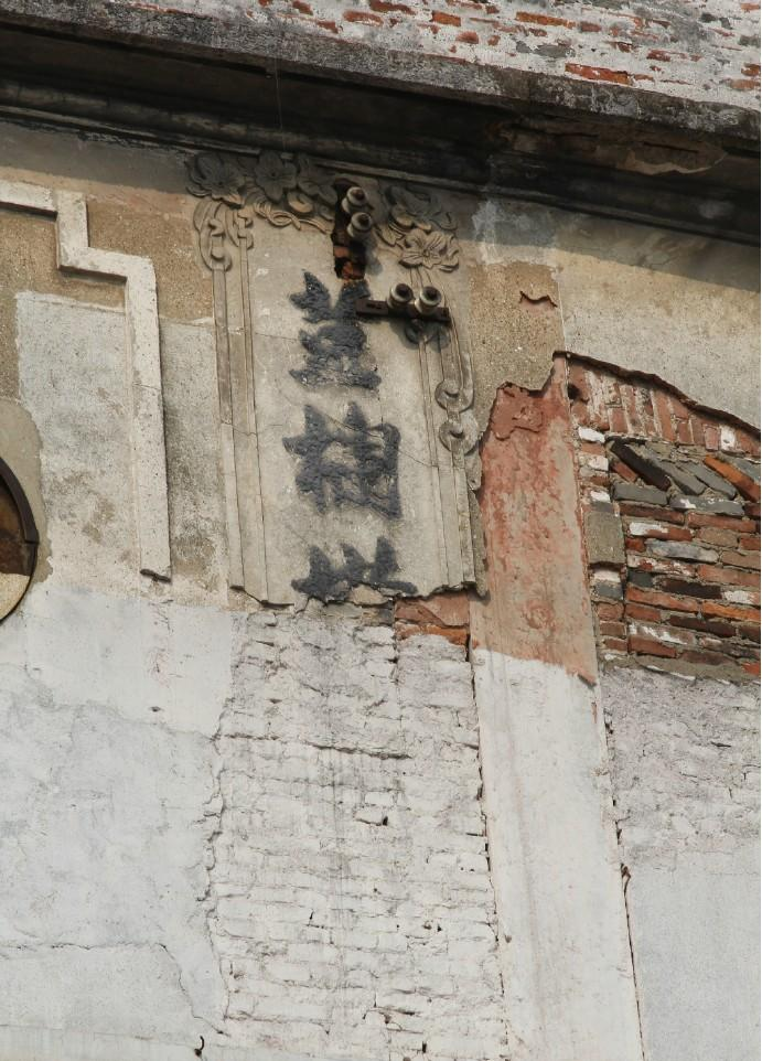 粵語: 鳳凰崗 誠志倉